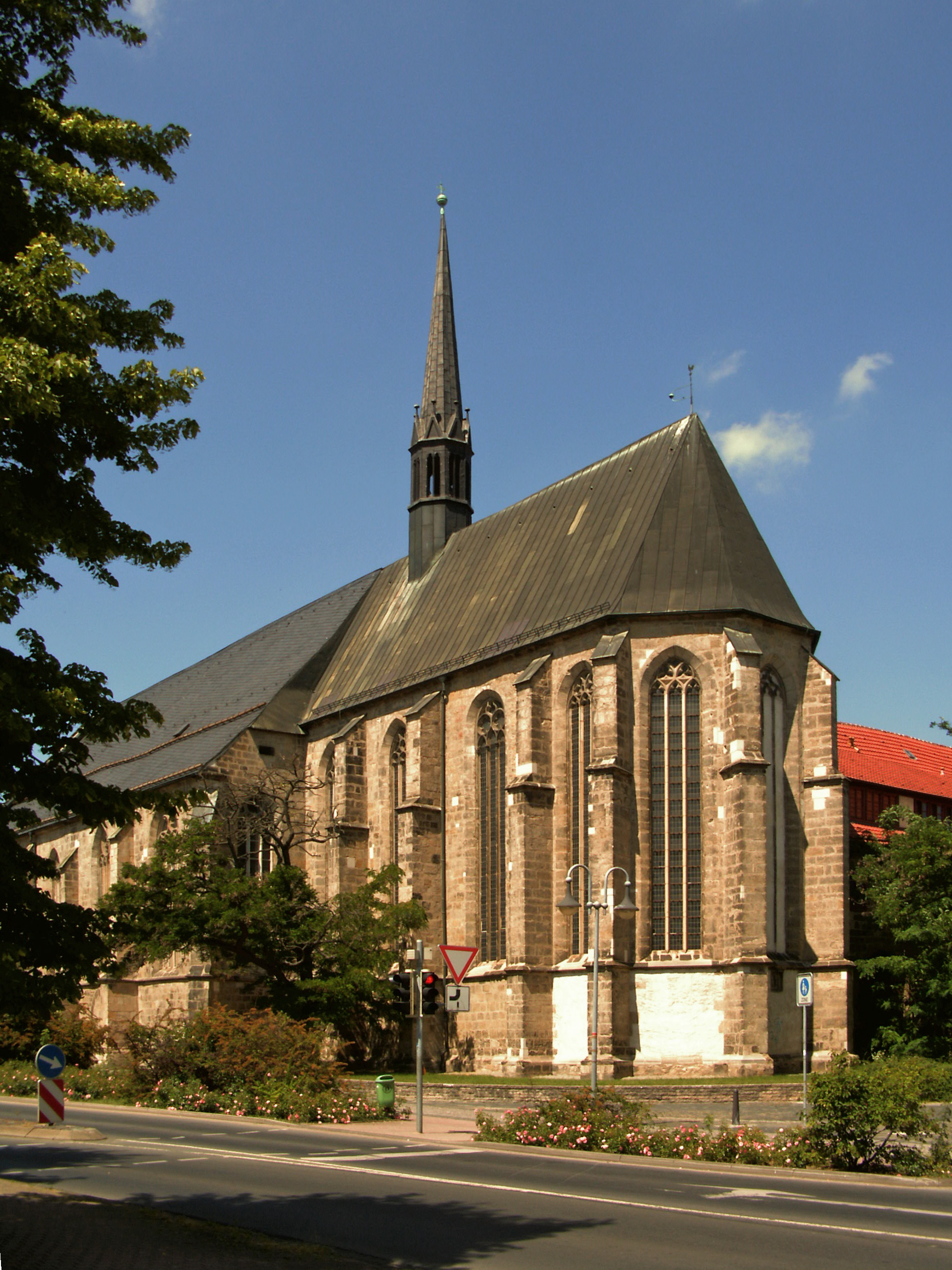 Katholische Kirche St. Katharina und Barbara in Halberstadt